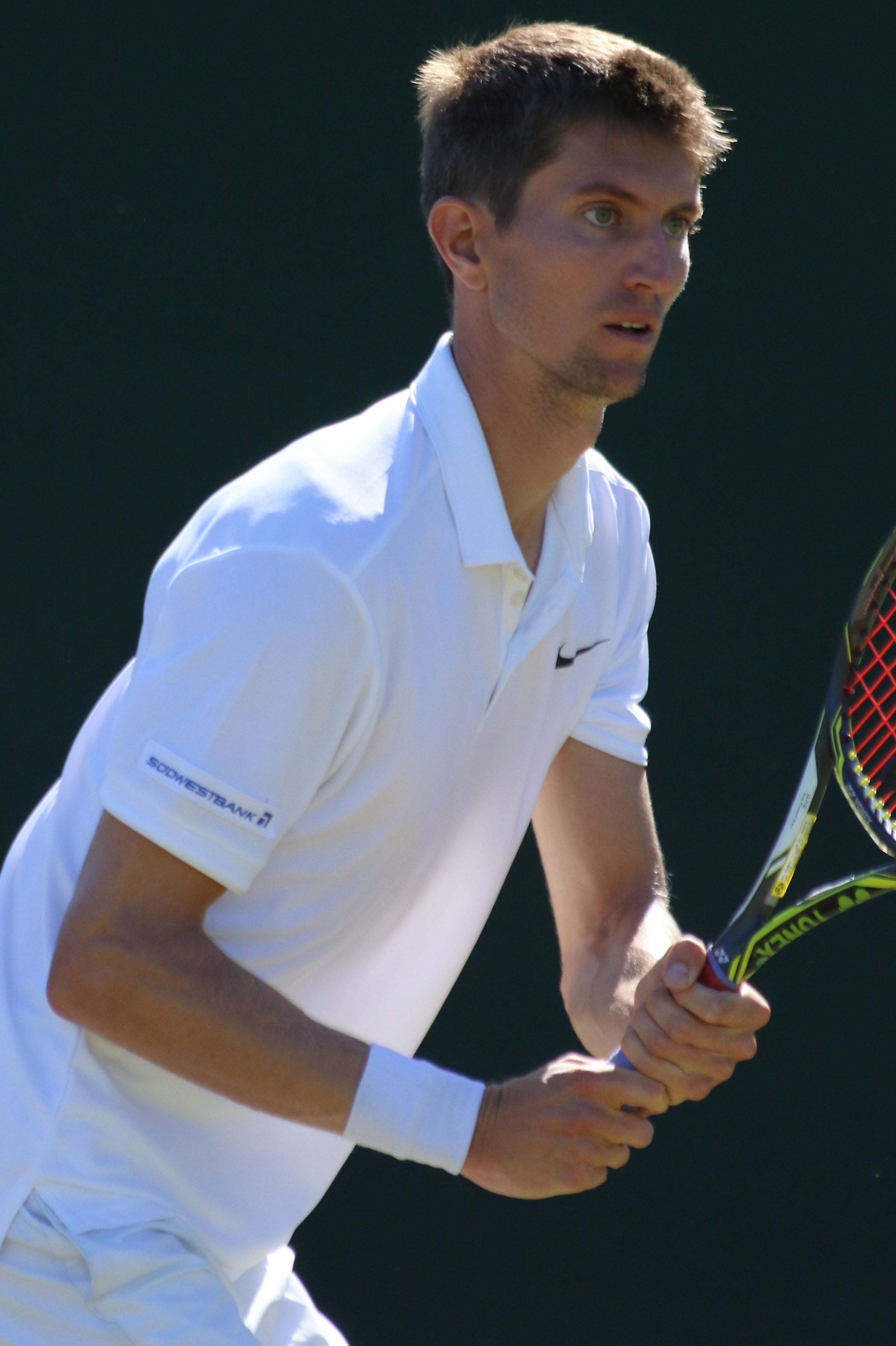 Maden WMQ18 (37)